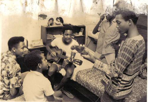 Playing Guitar at Kanda